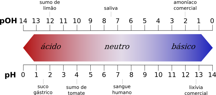 Escala de pH (e pOH), em português.